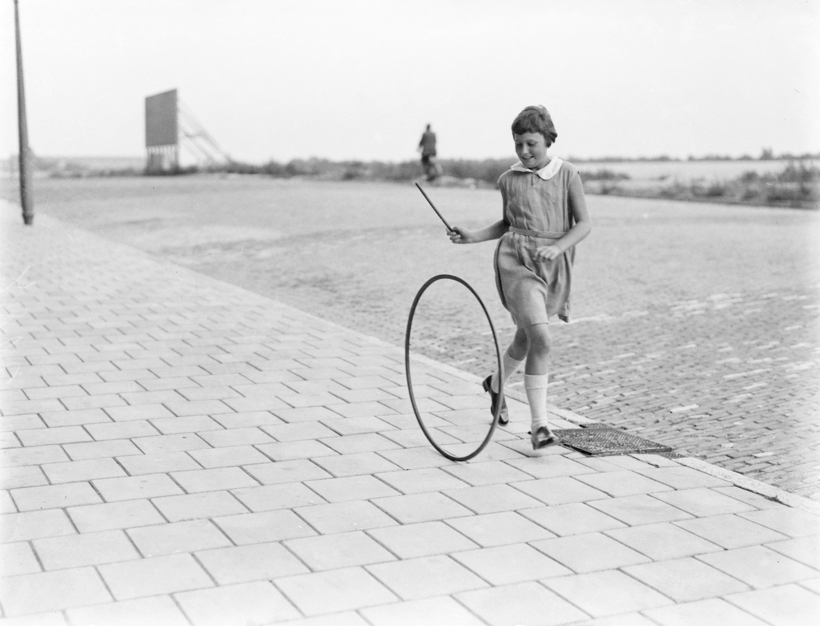 Nationaal Archief Beschrijving: kinderen, straatbeelden, hoepelen. Van der Polls stiefdochter Hans met een hoepel. Waarschijnlijk een foto voor een schoenencampagne van het Amerikaanse advertentiebedrijf Sell More. Datum: 1932 Bestanddeelnummer: 252-0845 Vervaardiger: Poll, Willem van de URL: [1] U kunt ons helpen onze kennis van de fotocollecties te verrijken door tags en commentaren toe te voegen. Herkent u mensen of locaties of heeft u een bijzonder verhaal te vertellen bij één van de foto’s, laat dan een reactie achter (als u ingelogd bent bij Flickr) of stuur een mailtje naar: !